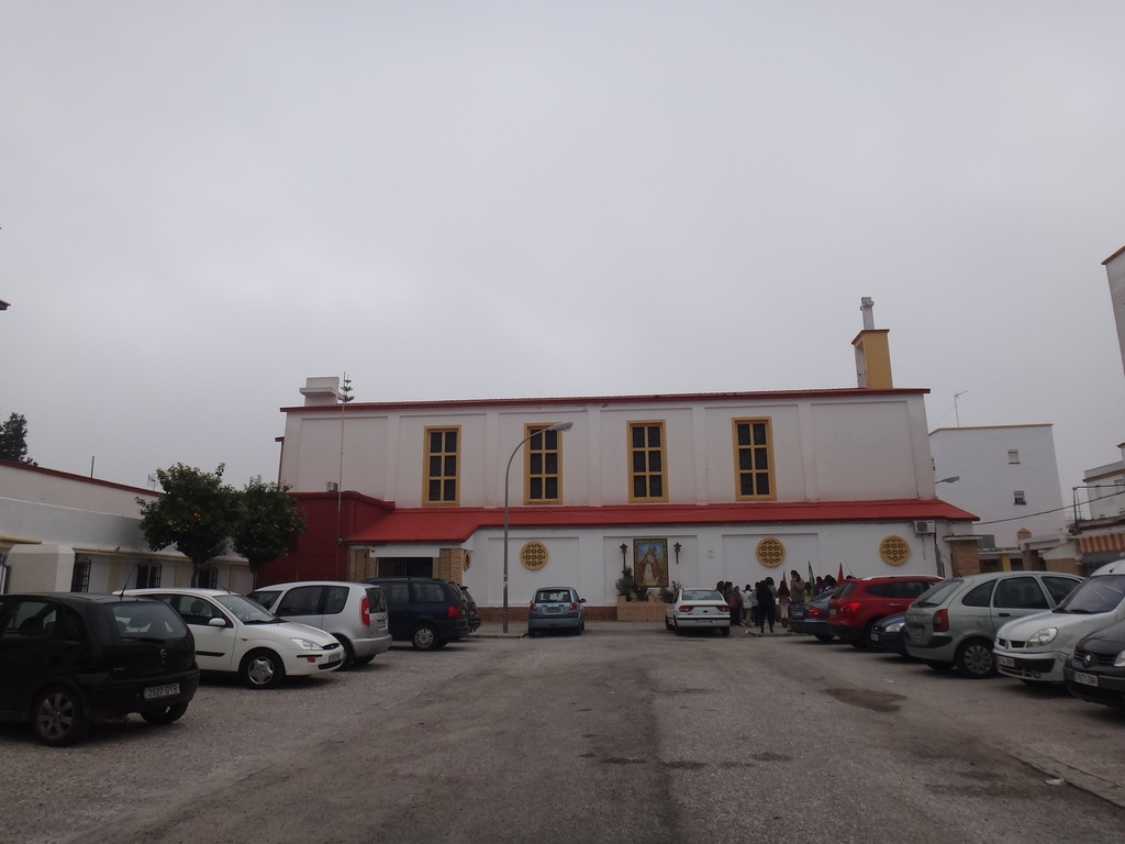 Lateral de Parroquia de Nuestra Señora de Las Viñas. Jerez Fra (Andalucía, España)